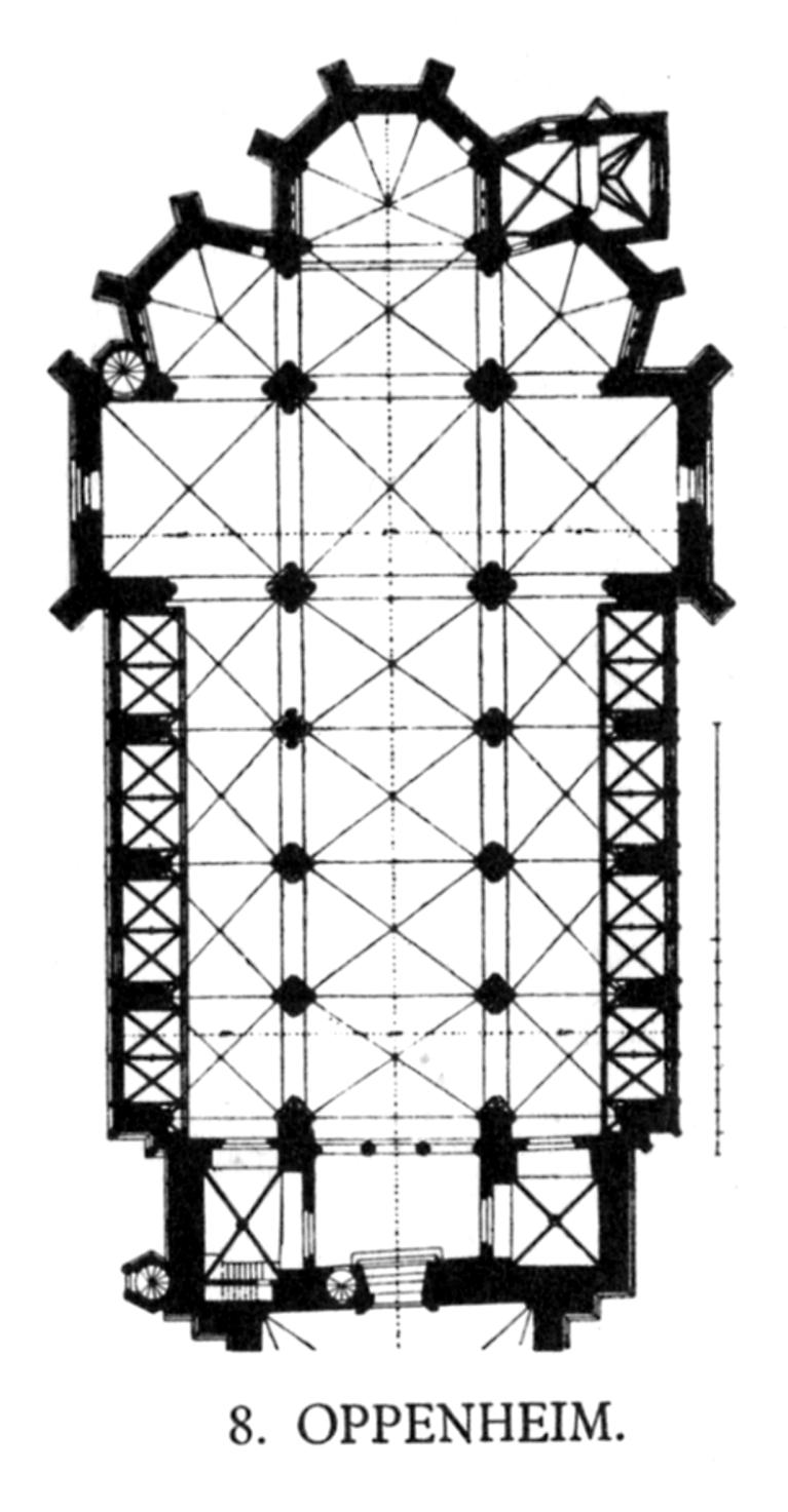 Oppenheim